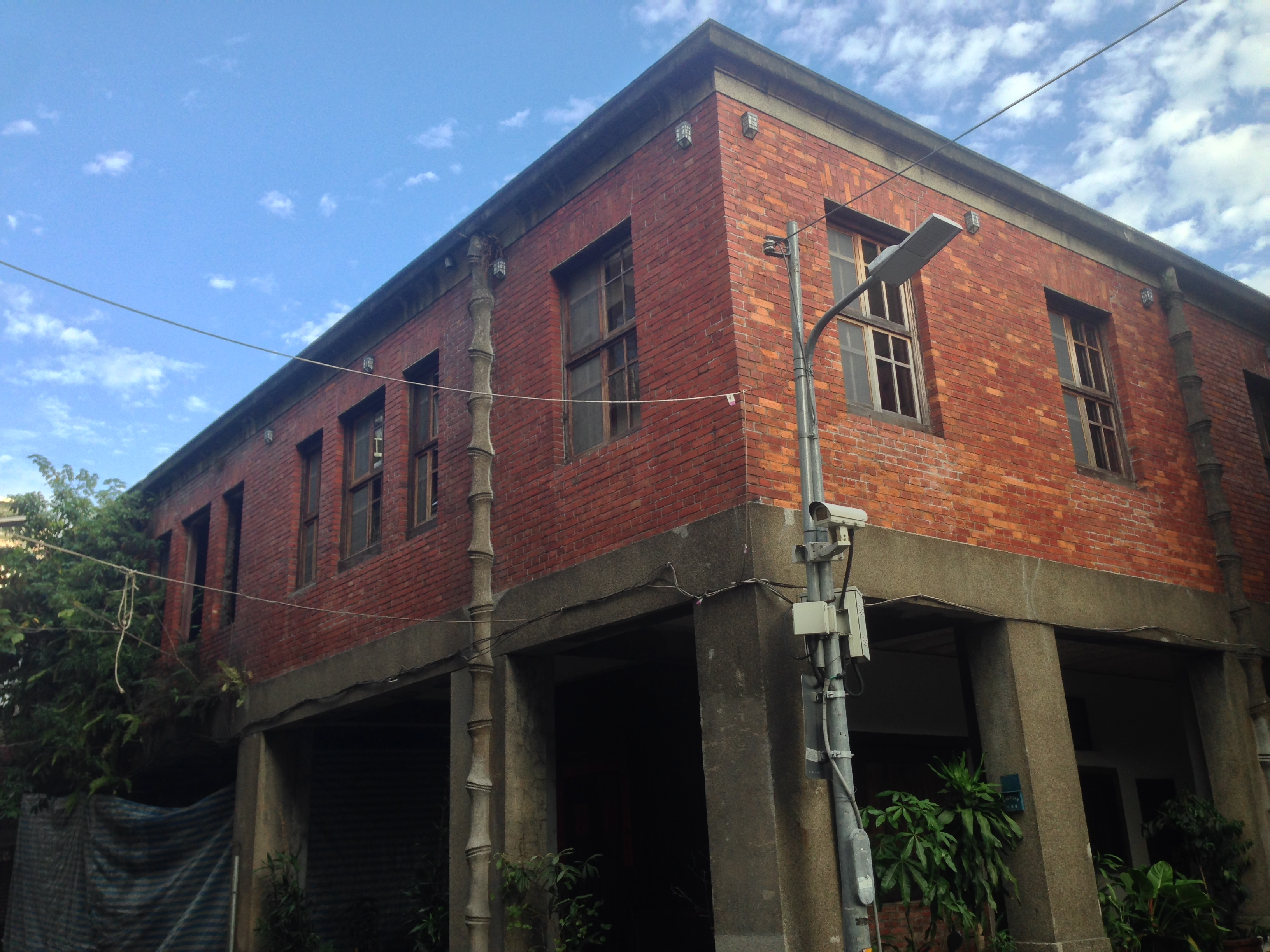 中文（台灣）: 西寧北路86巷8、12、14號店屋